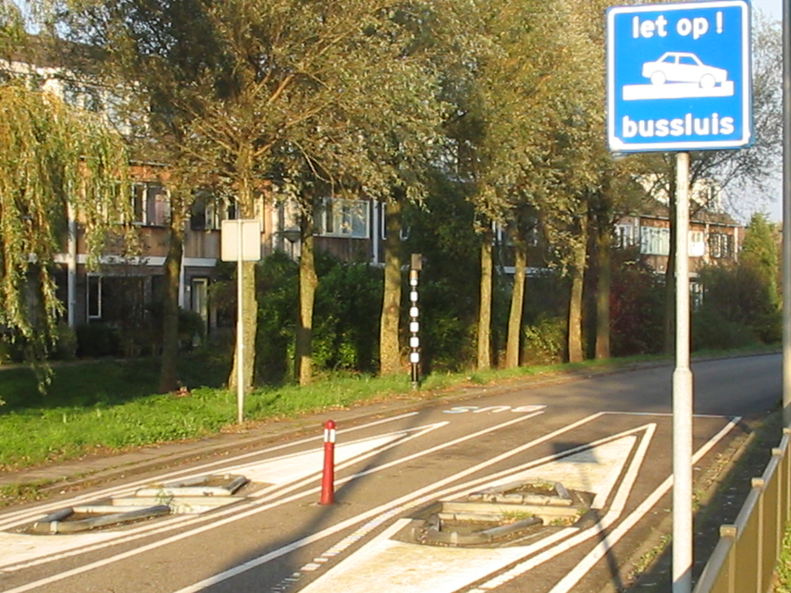 bussluis en bord, Delft Tanthof